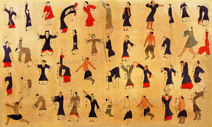 Seidentuch mit Qigongübungen, 206 vor Christi